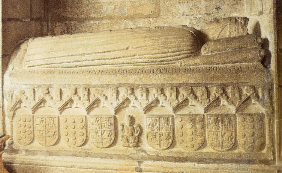 Sepulcro de la reina Juana de Castro (m. 1374), segunda esposa del rey Pedro I de Castilla. (Catedral de Santiago de Compostela).